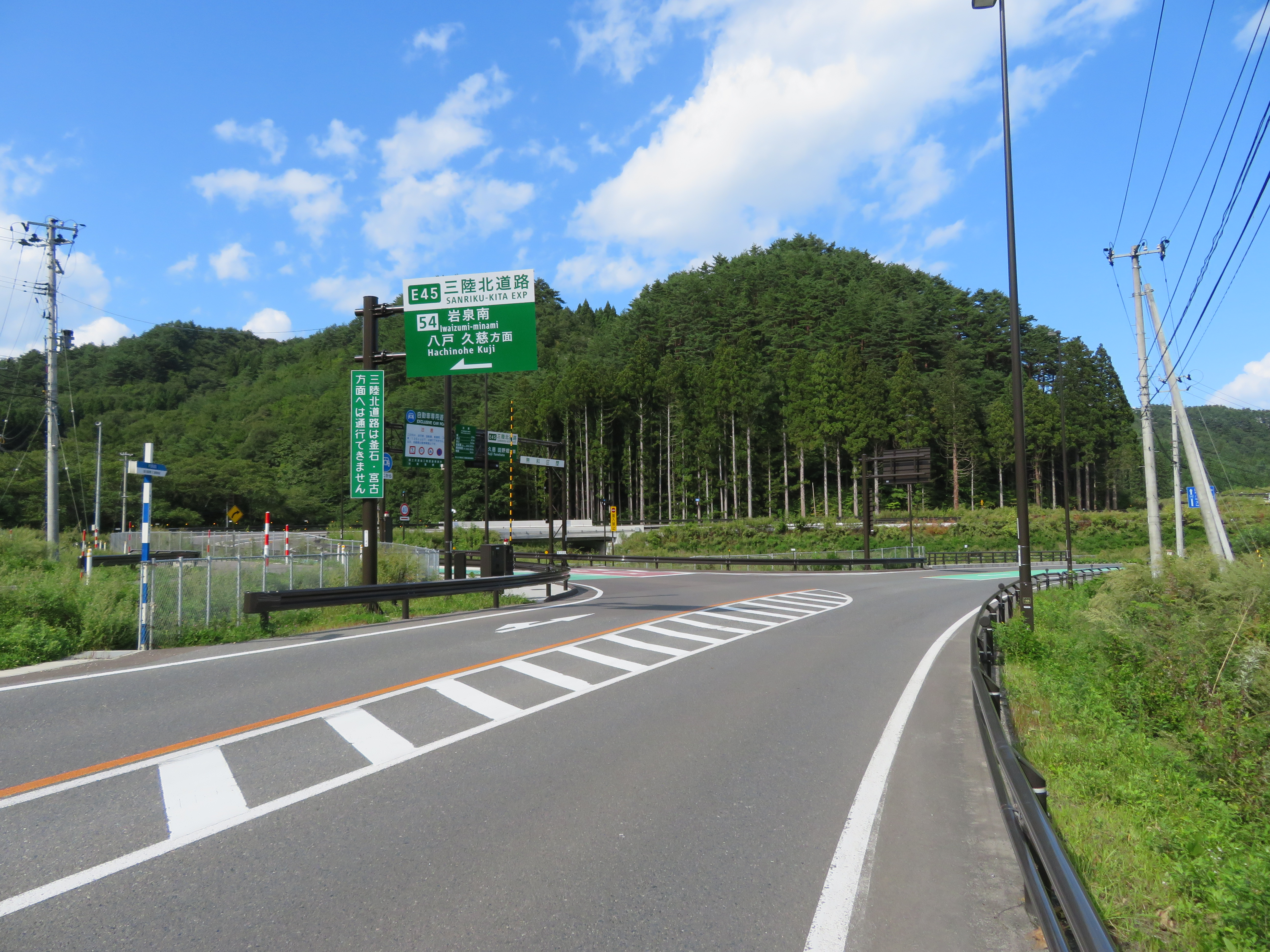 三陸北縦貫道路岩泉南インターチェンジ出入口付近（国道45号線との交差点付近） Canon PowerShot SX720 HS